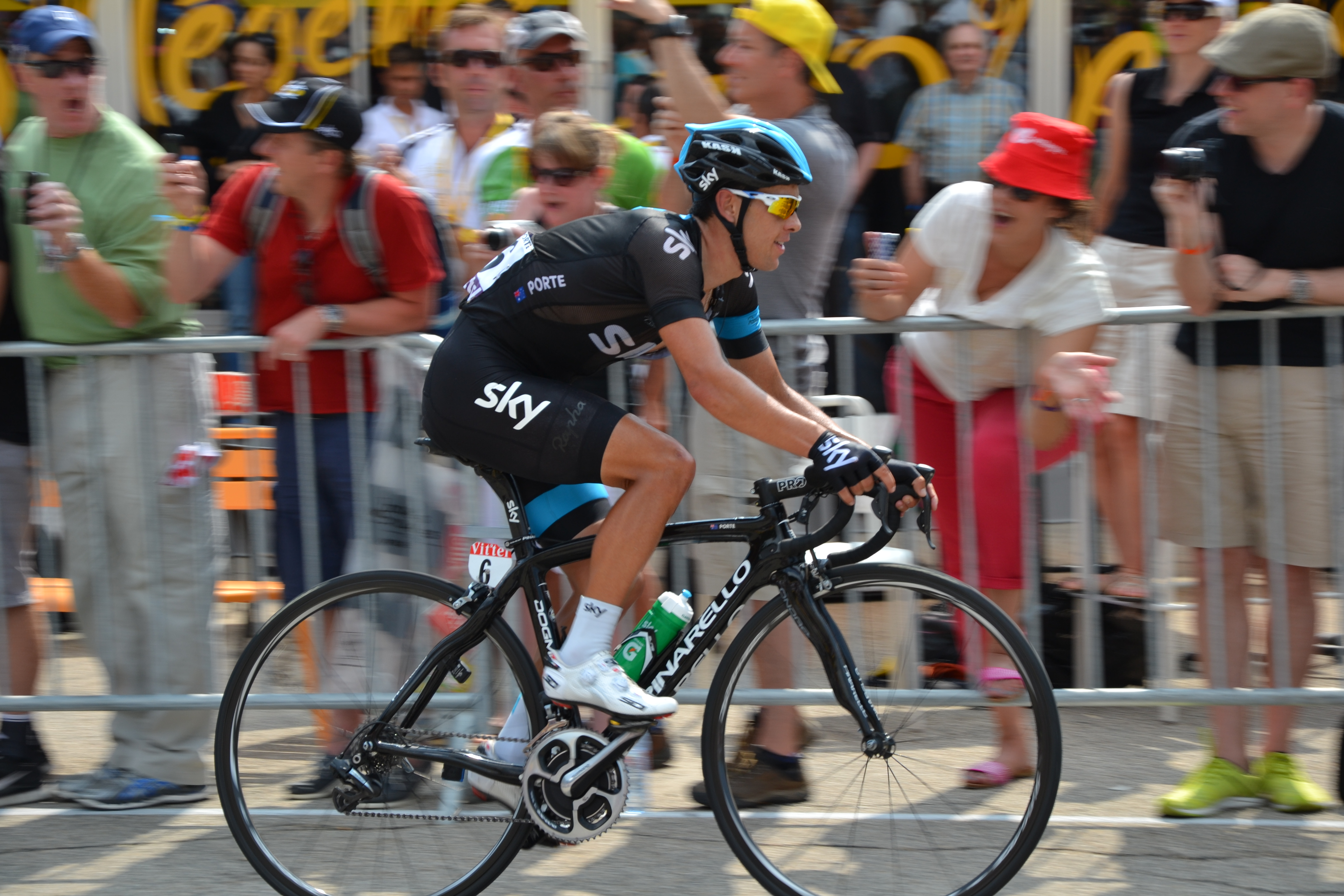 Richie Porte, au Chalet Reynard, Mont Ventoux, lors de la 15ème étape du Tour de France 2013